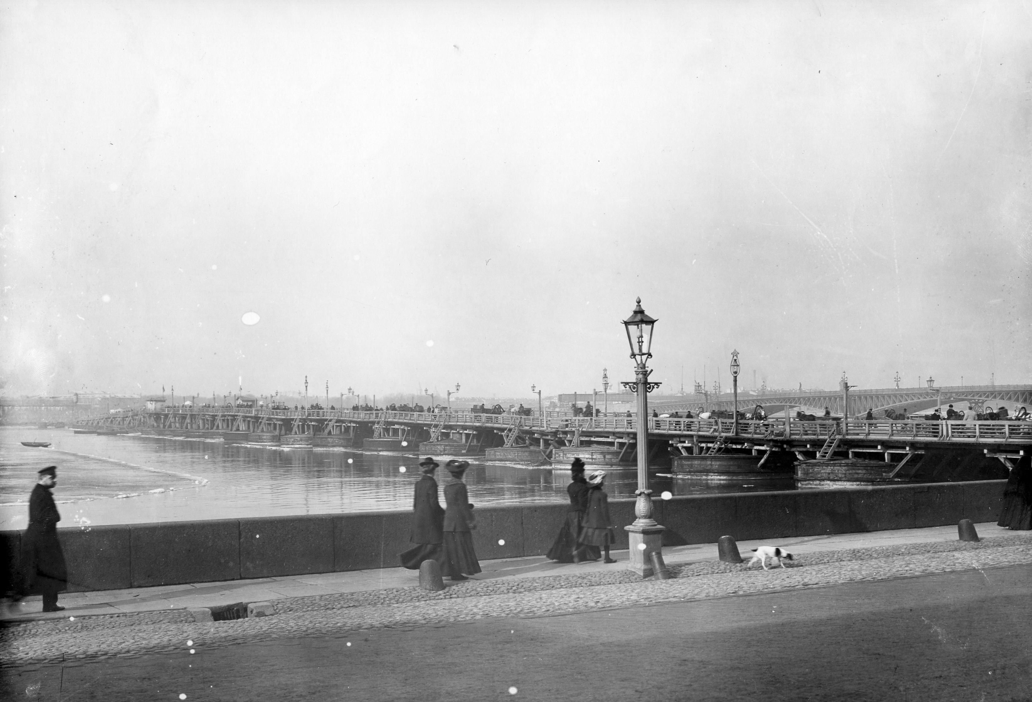 Временный наплавной мост. На заднем плане - строительство постоянного Троицкого моста